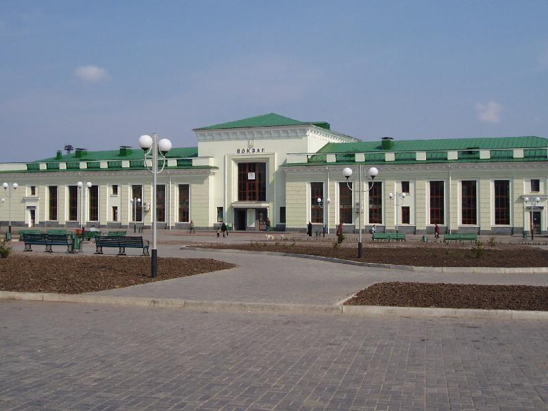 Залізничний вокзал станції Шепетівка